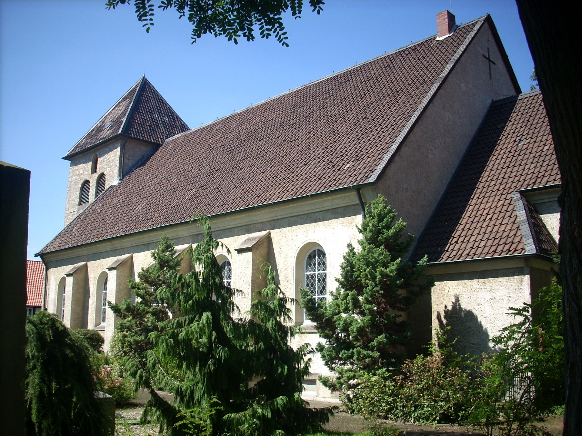 Ev. Kirche St. Andreas, Groß Lobke, Algermissen, Germany